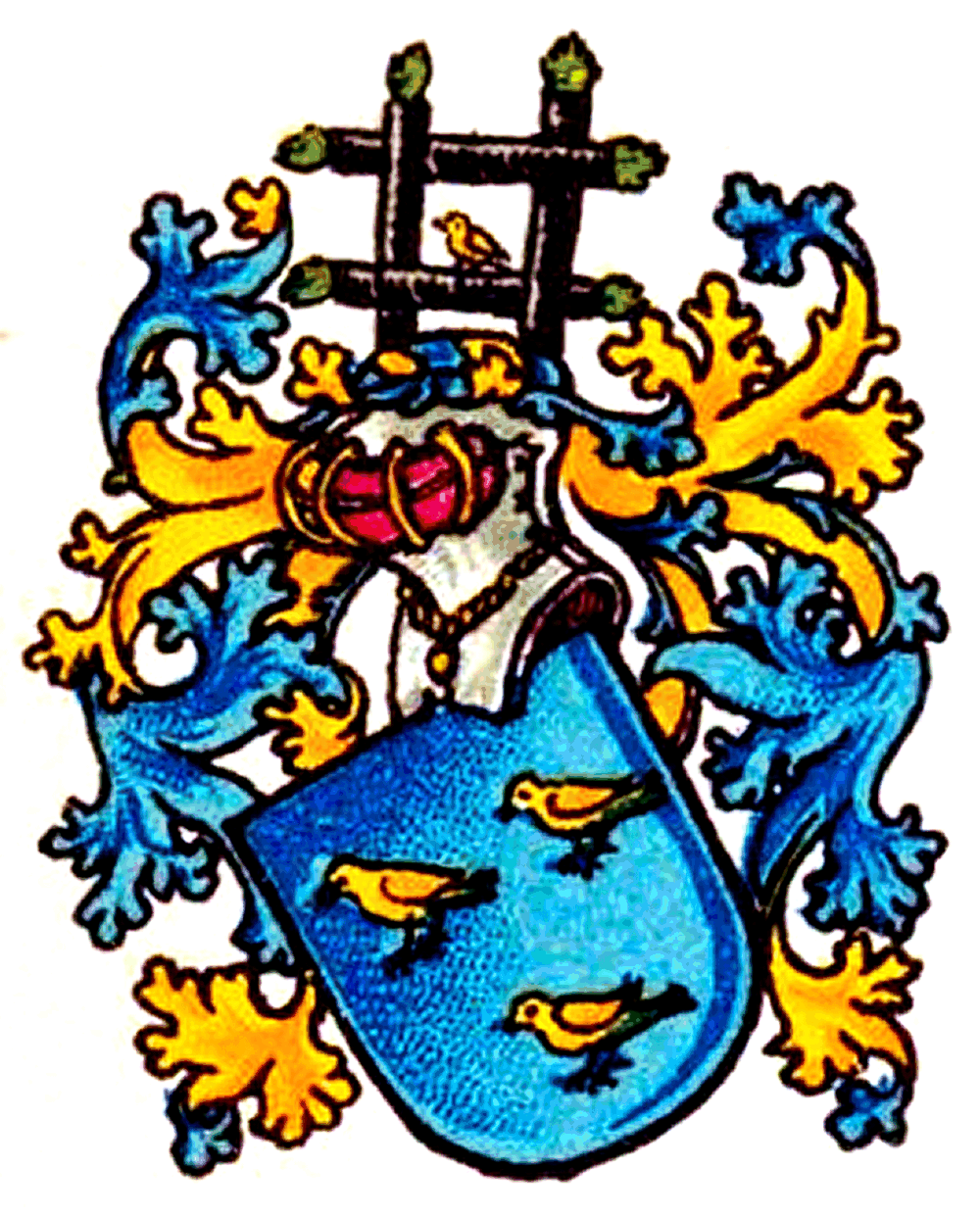 Wappen derer von Sperling